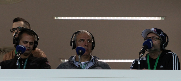 שידור רדיו של משחק מליגת העל בכדורגל בתחנת רדיו חיפה; השידור מועבר מתא שידור בראש יציע העיתונאים באצטדיון סמי עופר. בתמונה כדורגלני העבר אלון חרזי, רפי אוסמו ואיציק אהרונוביץ' (משמאל לימין)